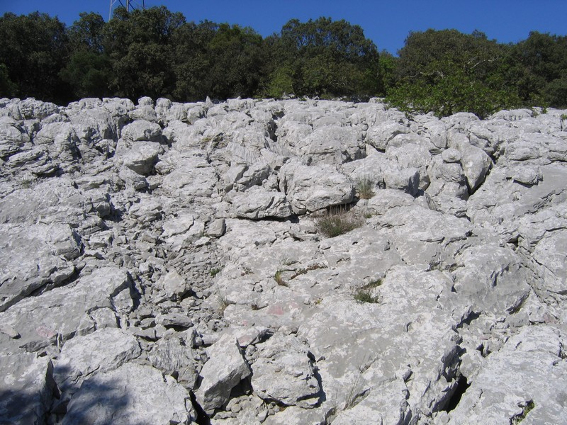 Description: Sol calcaire de type lapiaz, GarriguesHérault, France Source: Hugo Soria Licence: GFDL Hugo Soria